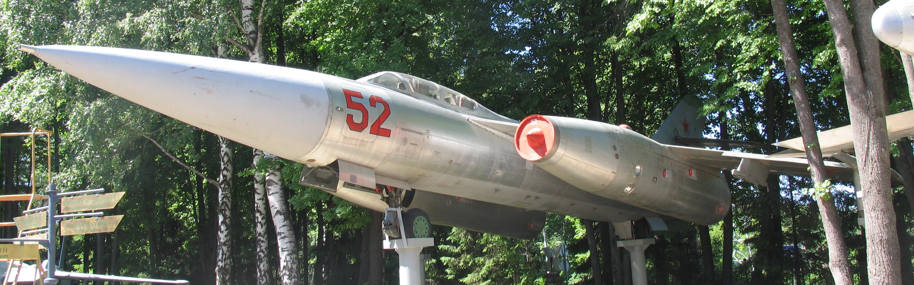 Як-28П в Музее техники Задорожного.